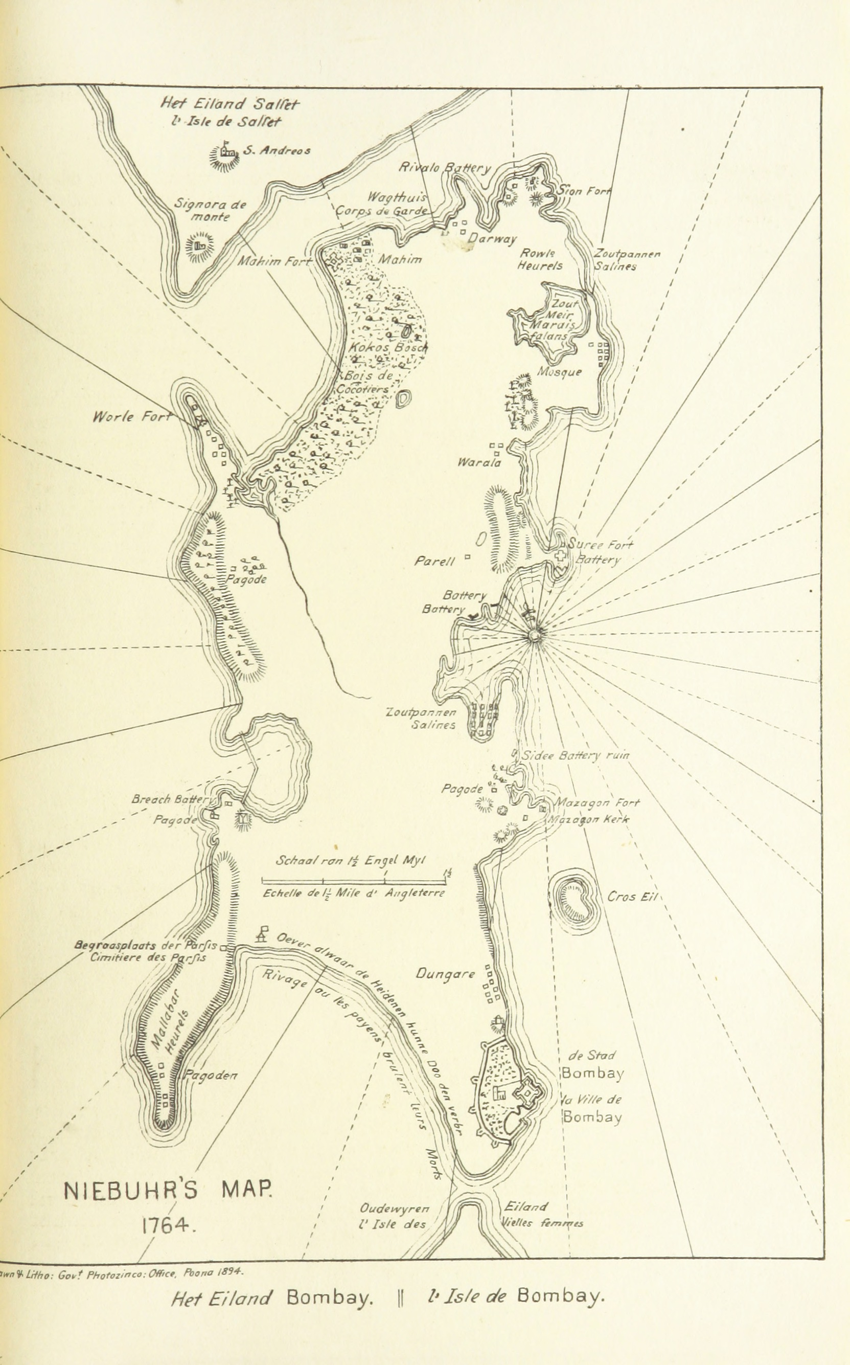 Bombay Niebuhr's Map 1764